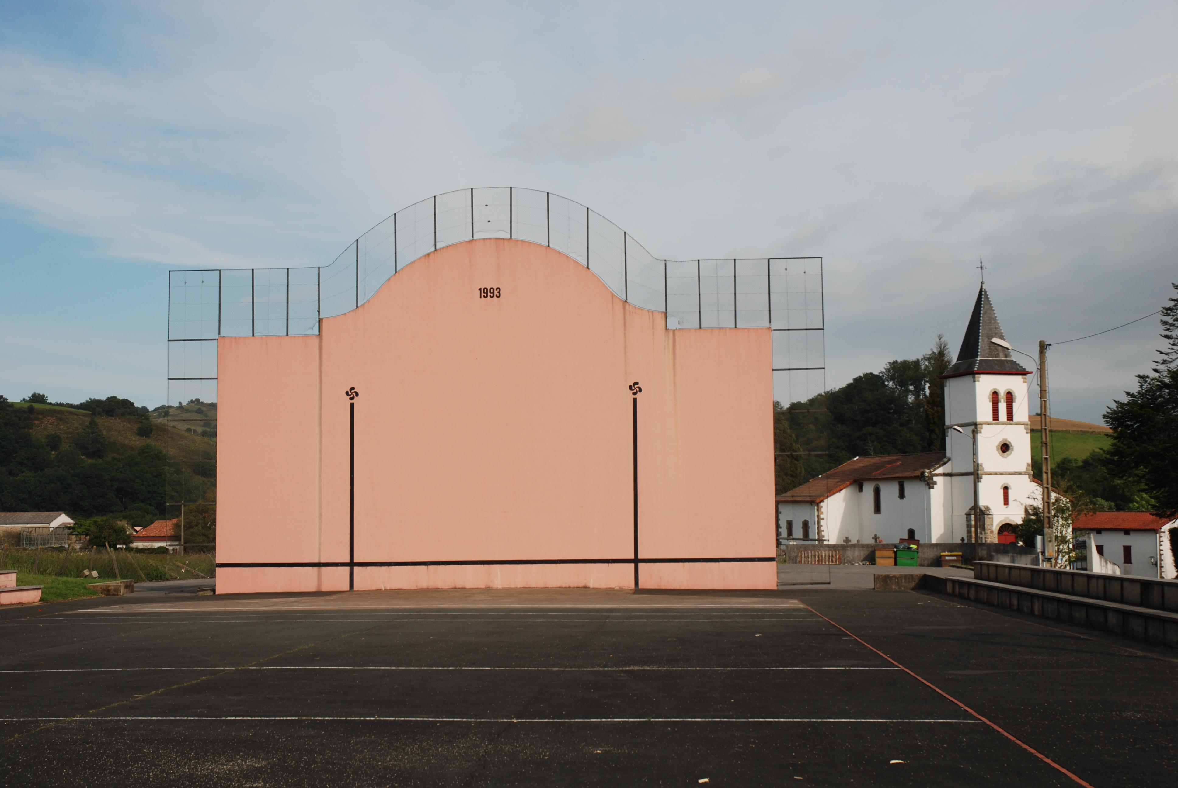 Méharin, fronton place libre, adossé à l'église